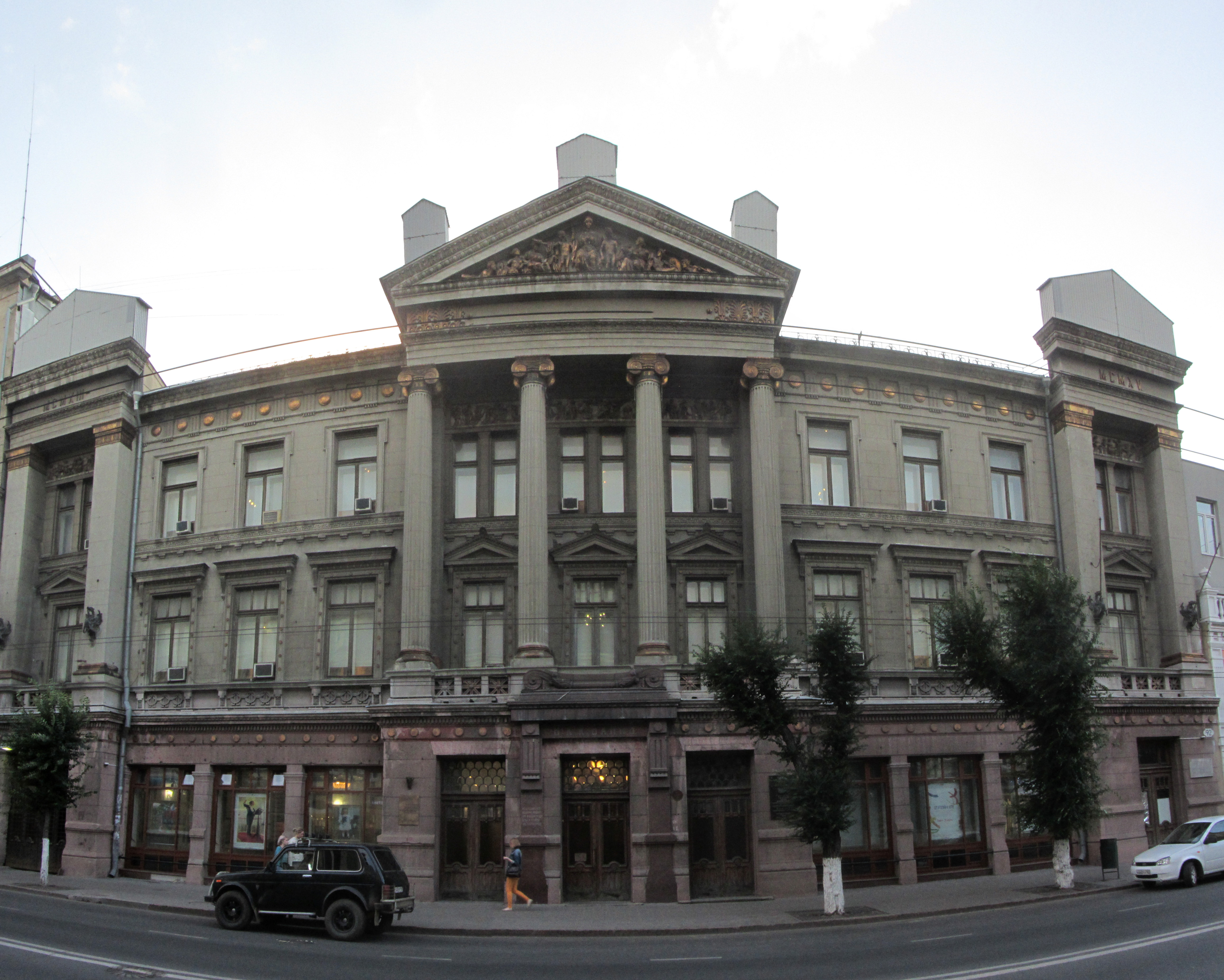 Волжско-Камский коммерческий банк: улица Куйбышева, 92, Самара, Самарская область